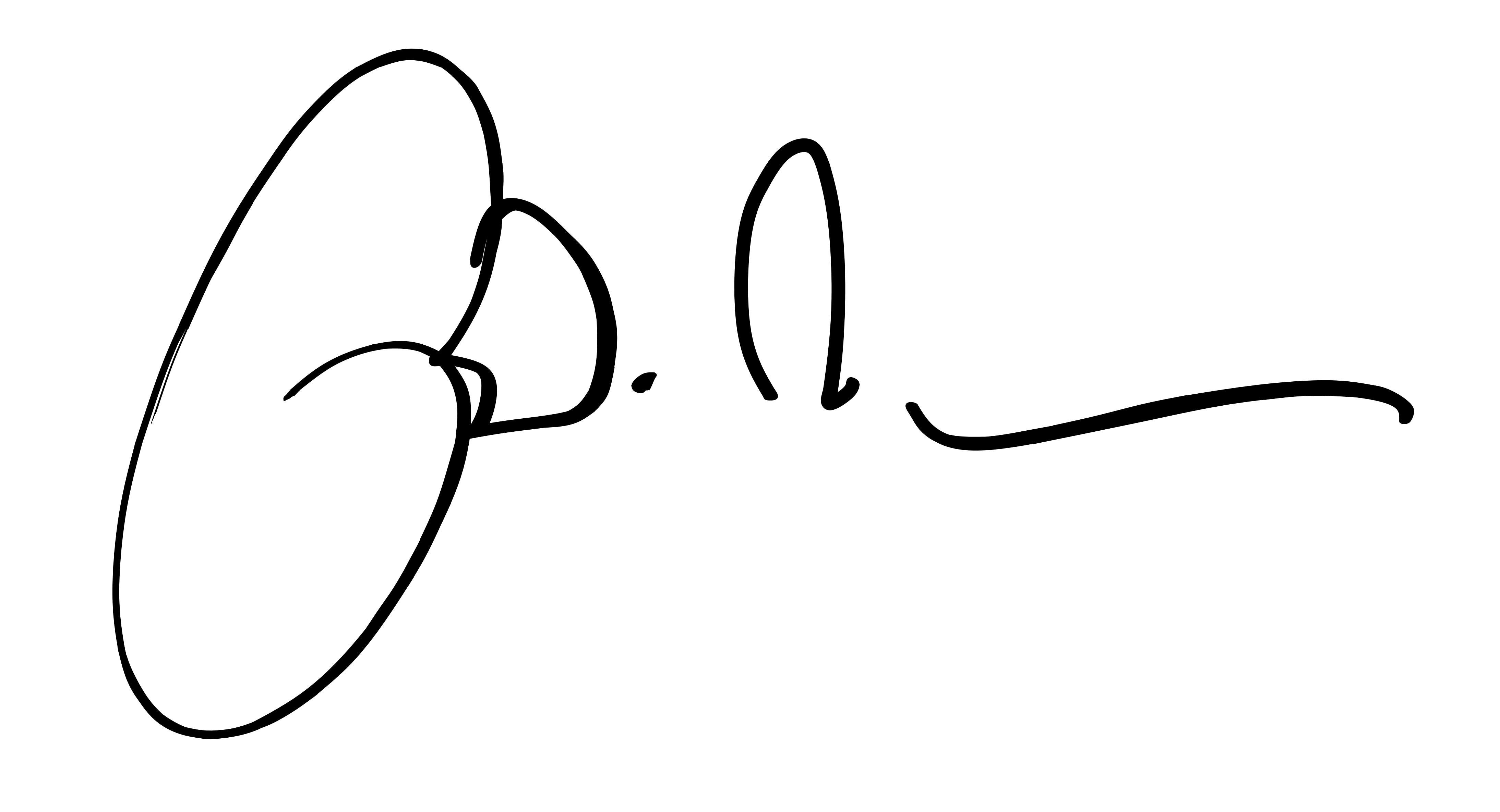 Die Unterschrift von Bodo Wartke einer Autogrammkarte.